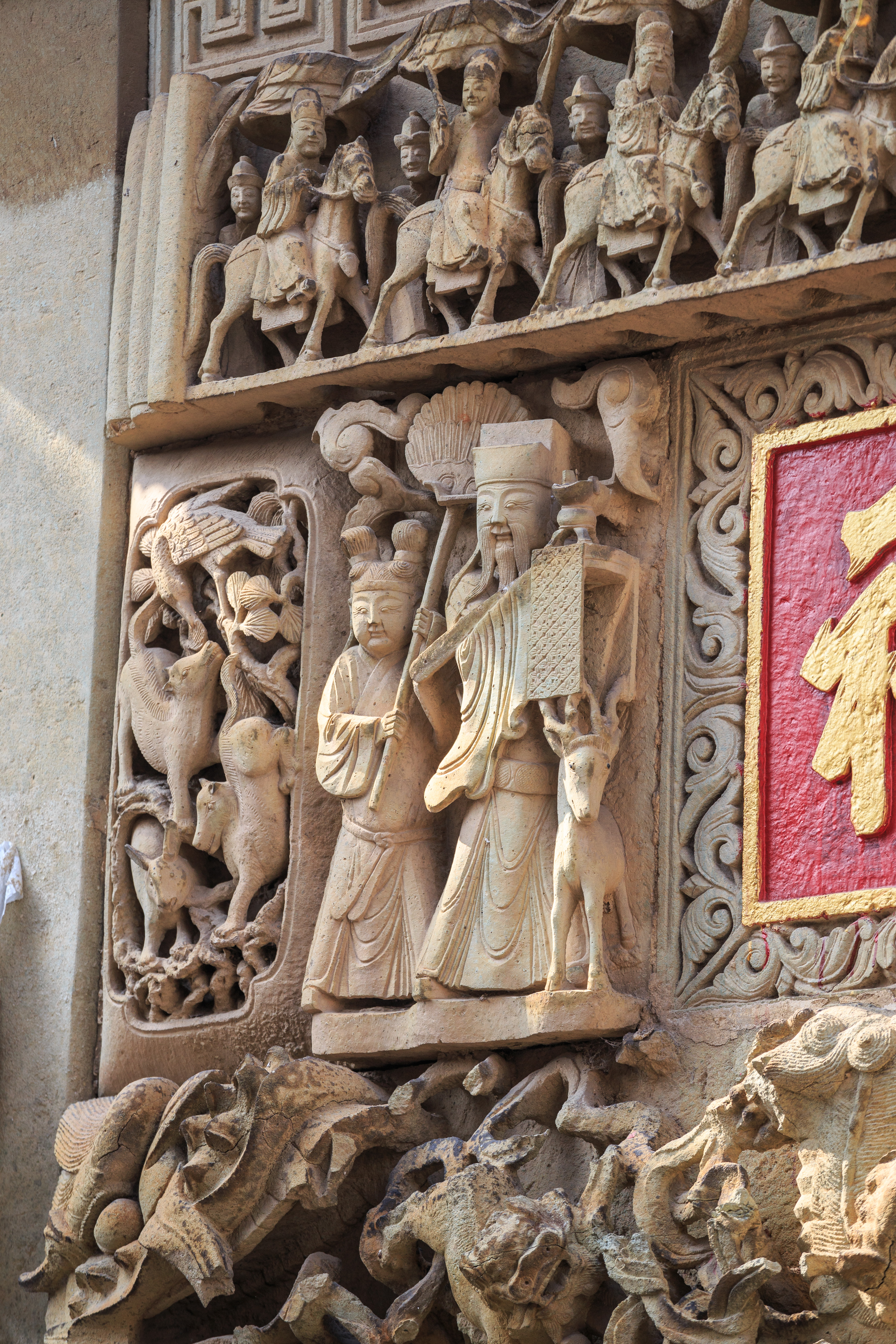 安坑龚氏宗祠 叙千祠